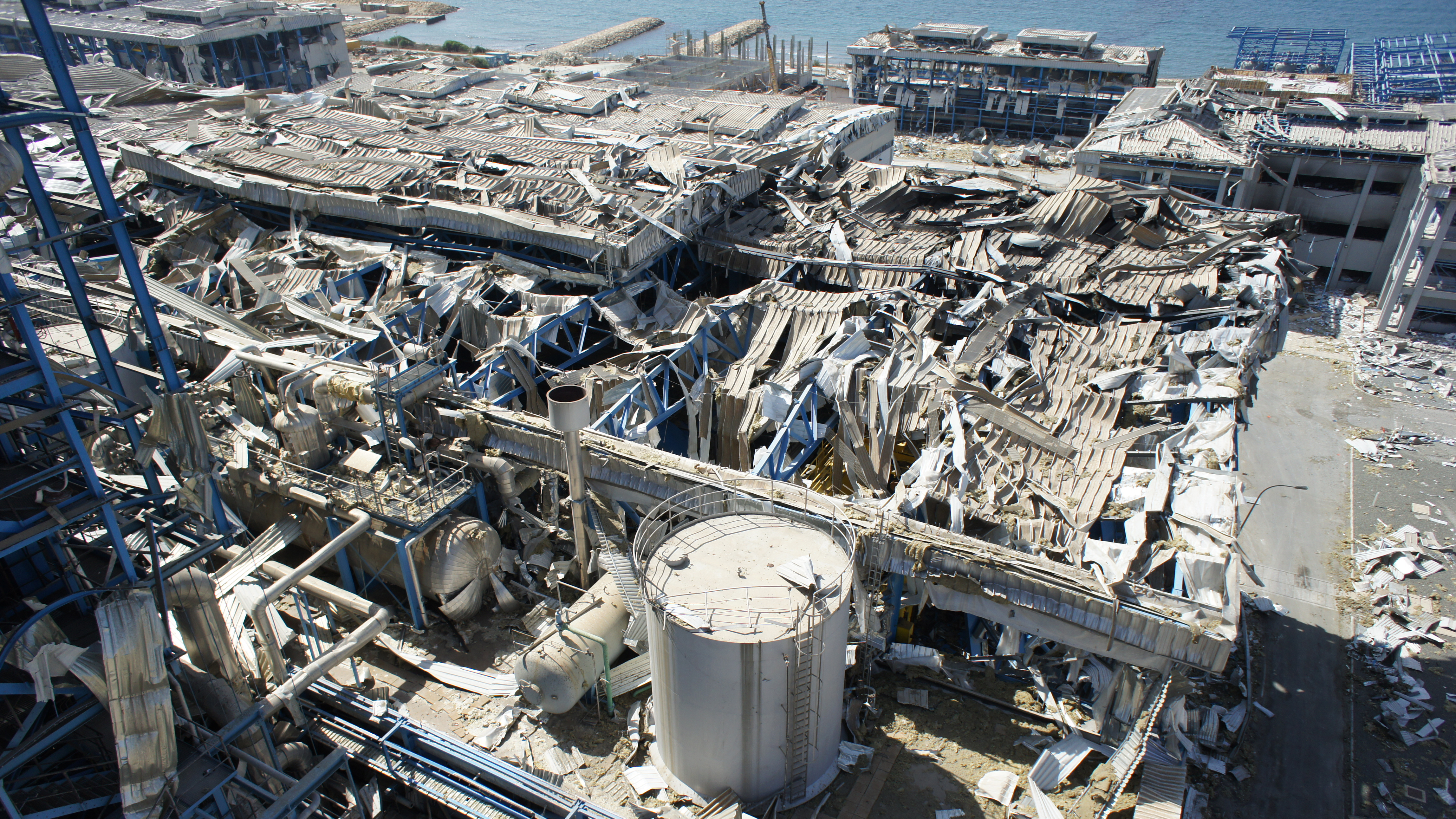 Luftansicht auf die Turbinenhalle Am 11. Juli 2011 explodierten in einem Marinestützpunkt auf der Insel Zypern 98 Munitionscontainer. Hierbei kamen 13 Menschen ums Leben. Ein nahe gelegenes 793 Megawatt Kraftwerk, das für 50 Prozent der Energieversorgung Zyperns verantwortlich ist, wurde stark beschädigt. Im Rahmen einer europäischen Hilfsaktion flogen am 22. Juli 2011 drei Mitarbeiter des Deutschen Zentrums für Luft- und Raumfahrt (DLR) nach Zypern. Die Wissenschaftler erkundeten die Lage in dem einsturzgefährdeten Kraftwerk mit unbemannten Luftfahrzeugen (UAVs) und lieferten Bilder sowie Videos von den einzelnen Gebäuden und Räumen.